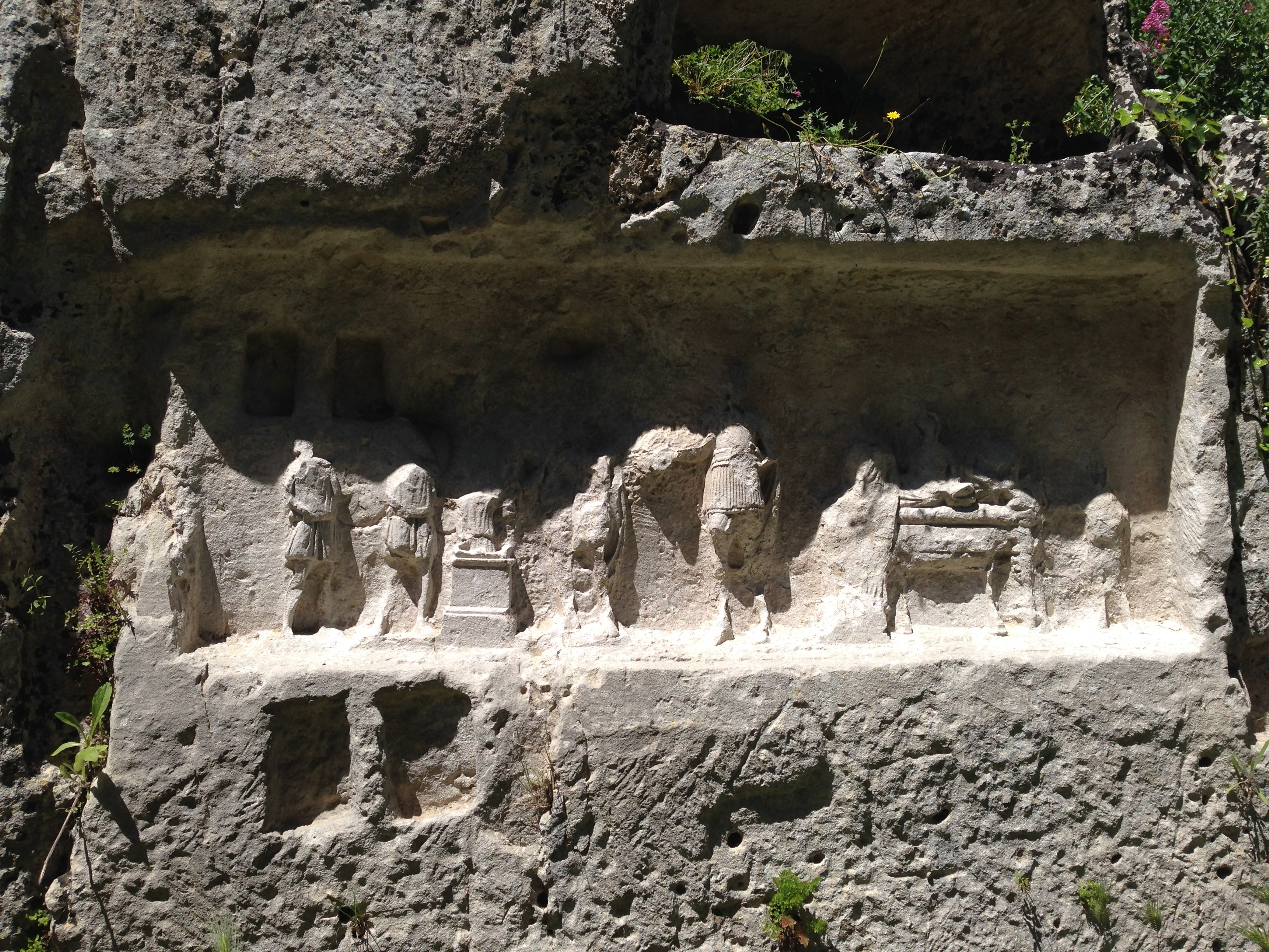 Latomie di Akrai